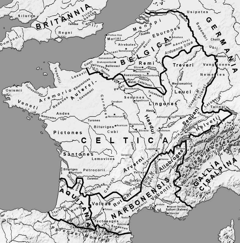 Romeinse provinsies en stamgroepe van die Galliese gebied in die laat 1ste eeu v.C.